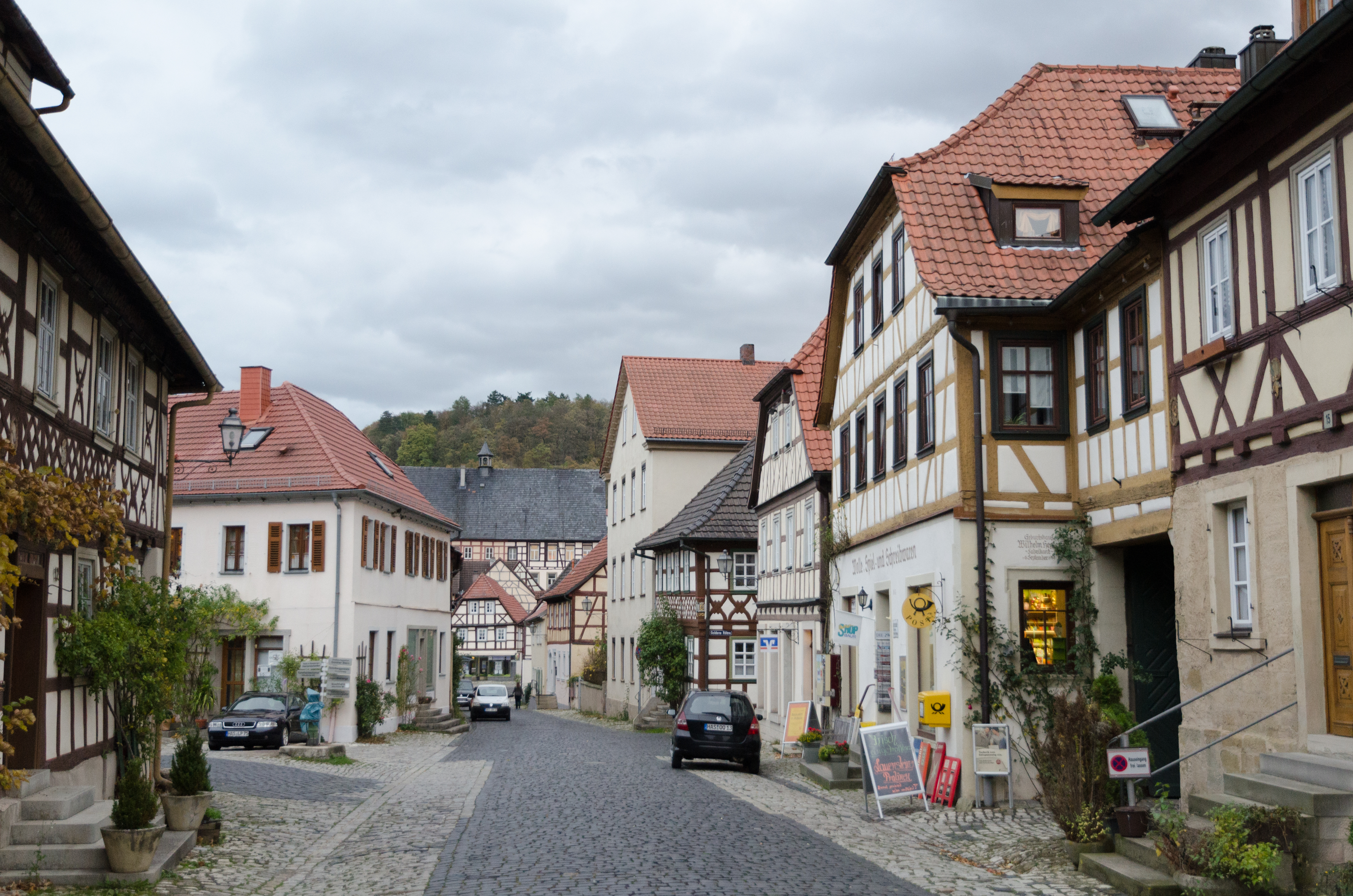 Königsberg in Bayern, Eduard-Lingel-Straße, Südseite